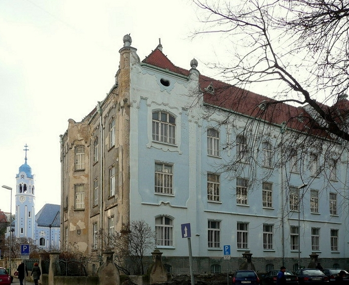 Budova Gymnázia Grösslingová v Bratislave